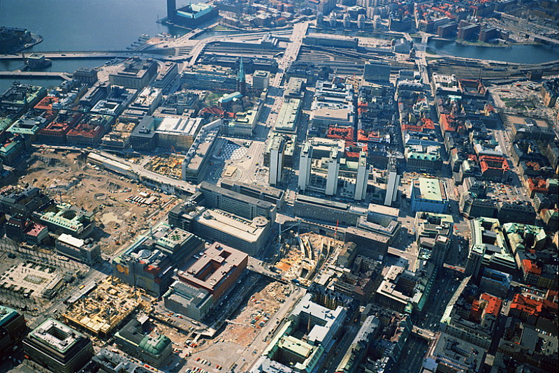 Kungsholmen, Norrmalm, Brunkebergstorg, Stadshuset, Drottninggatan, Hamngatan, Sergels torg, Gustav Adolfs torg, Hötorgsskraporna, Regeringsgatan, City. Rivningar. Motiv: Stockholms innerstad Nyckelord: Flygbilder, Riksintressen Kategori: Stadsmiljö Kungsholmen, Norrmalm, Brunkebergstorg, Stadshuset, Drottninggatan, Hamngatan, Sergels torg, Gustav Adolfs torg, Hötorgsskraporna, Regeringsgatan, City. Rivningar.